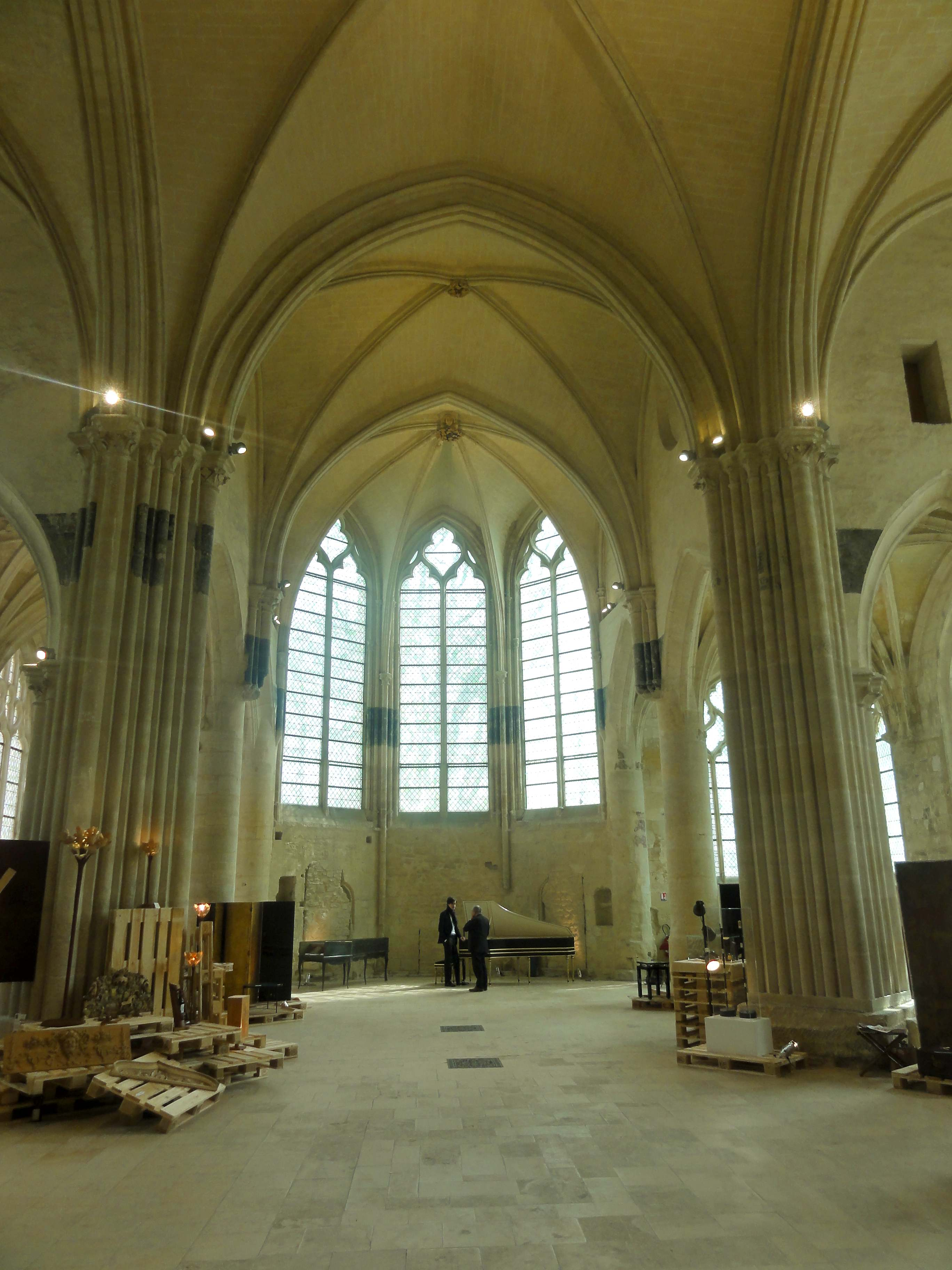 Intérieur de l'église - voir titre.